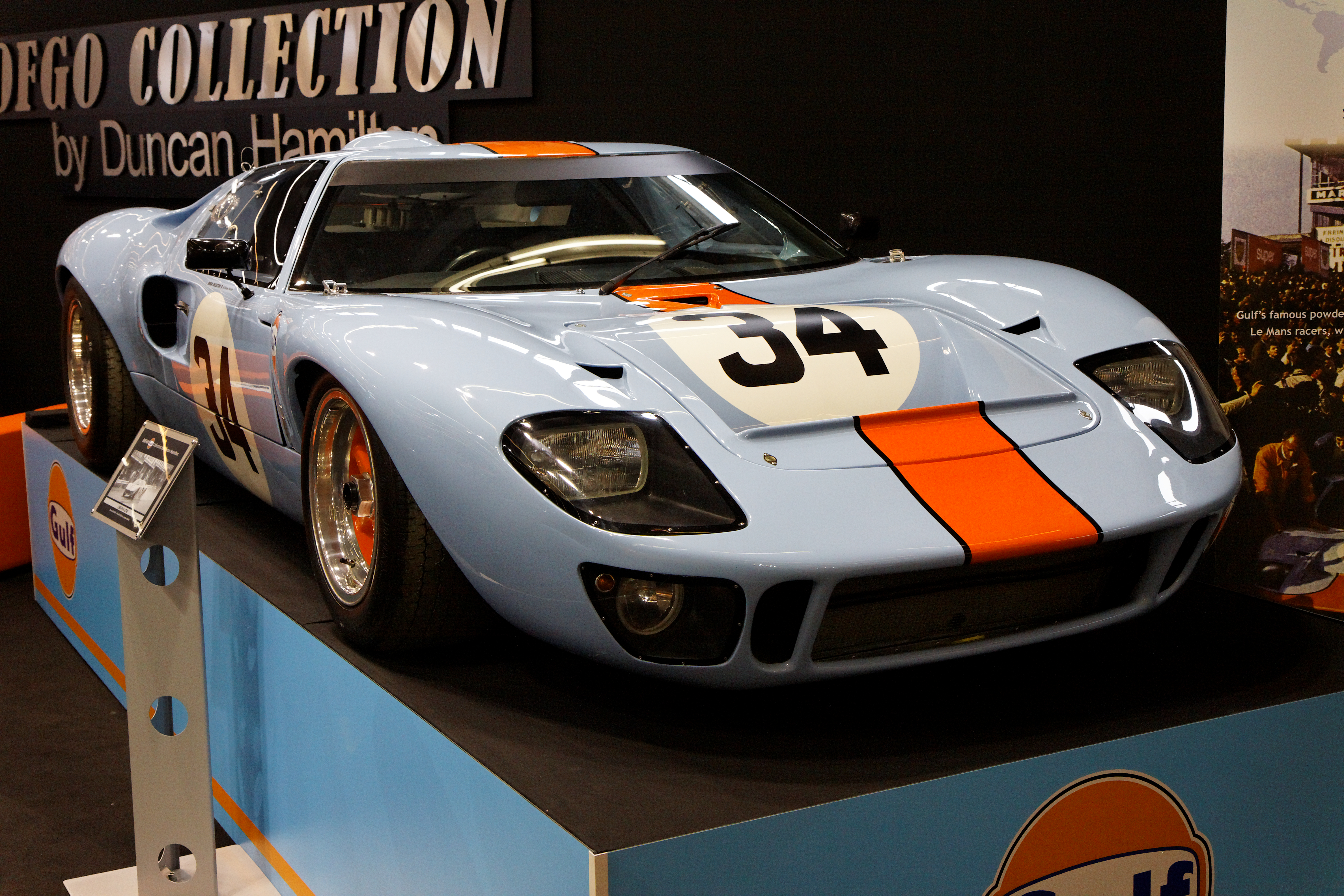 Photographie prise lors du salon rétromobile 2011 à Paris, porte de Versailles. Ford GT40 Chassis No.1084. 4ème au 1000 km de SPA de 1968 (équipage Hawkins/Hobbs)